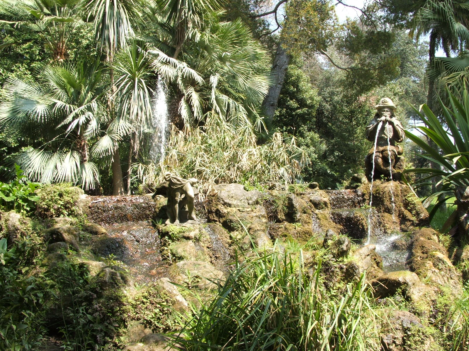 Der Brunnen des Hirtenknaben im Englischen Landschaftsgarten des Königspalastes von Caserta